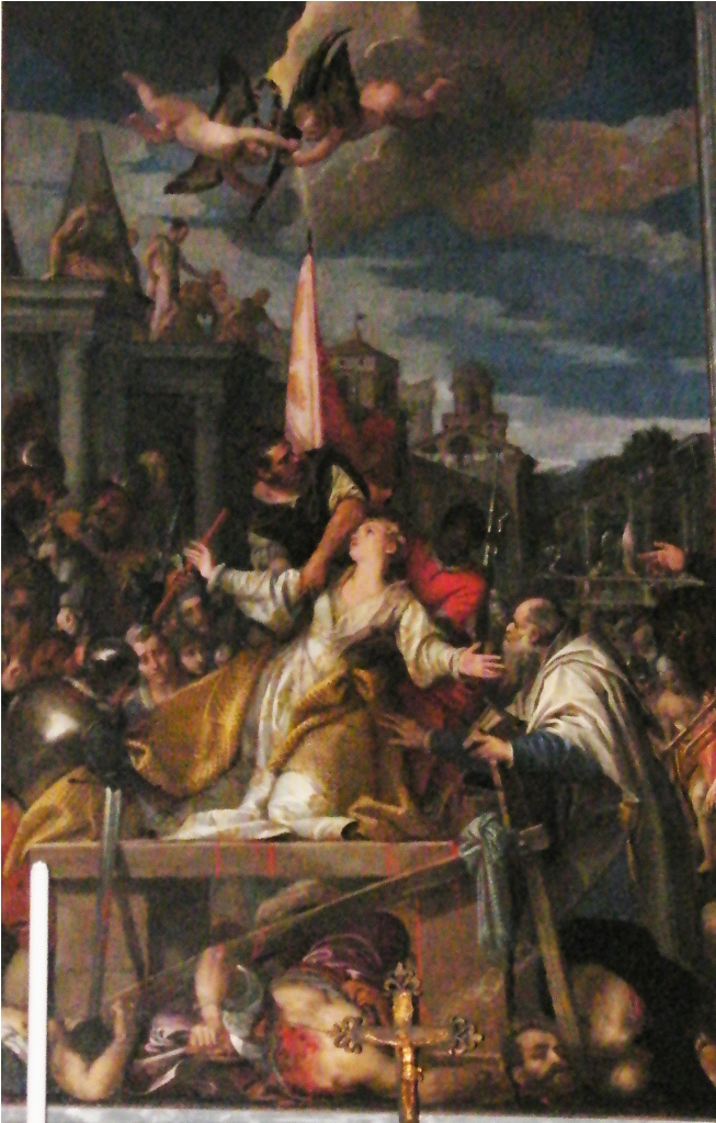 Martirio di Sant'Afra (Paolo Veronese) - Chiesa di S. Afra in S. Eufemia - Brescia